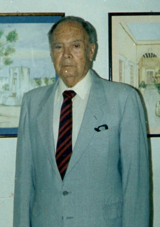 Muestra al Dr. Antonio González Guevara exhibiendo su obra pictórica